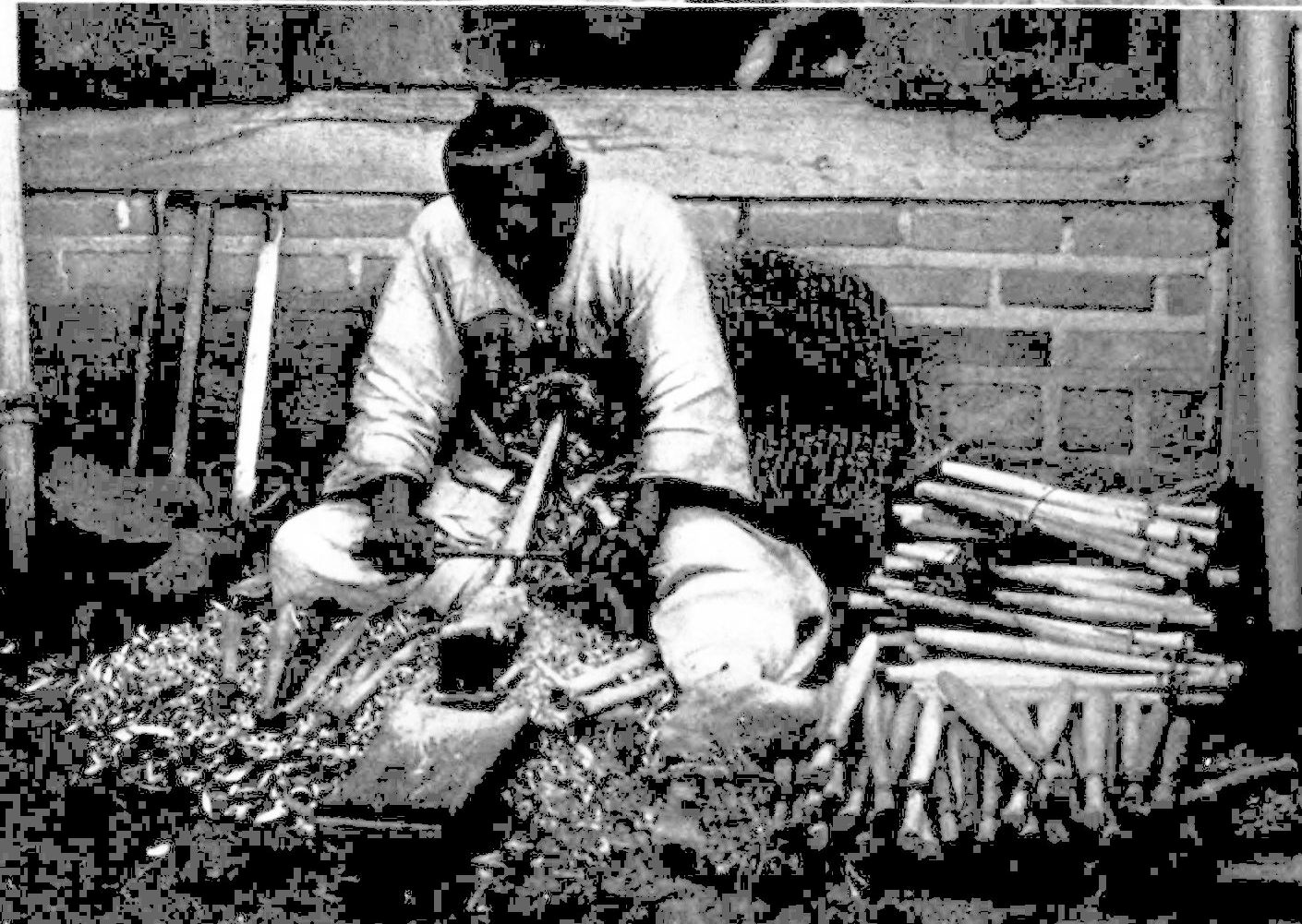 A man making Dadeumitbangmang-i